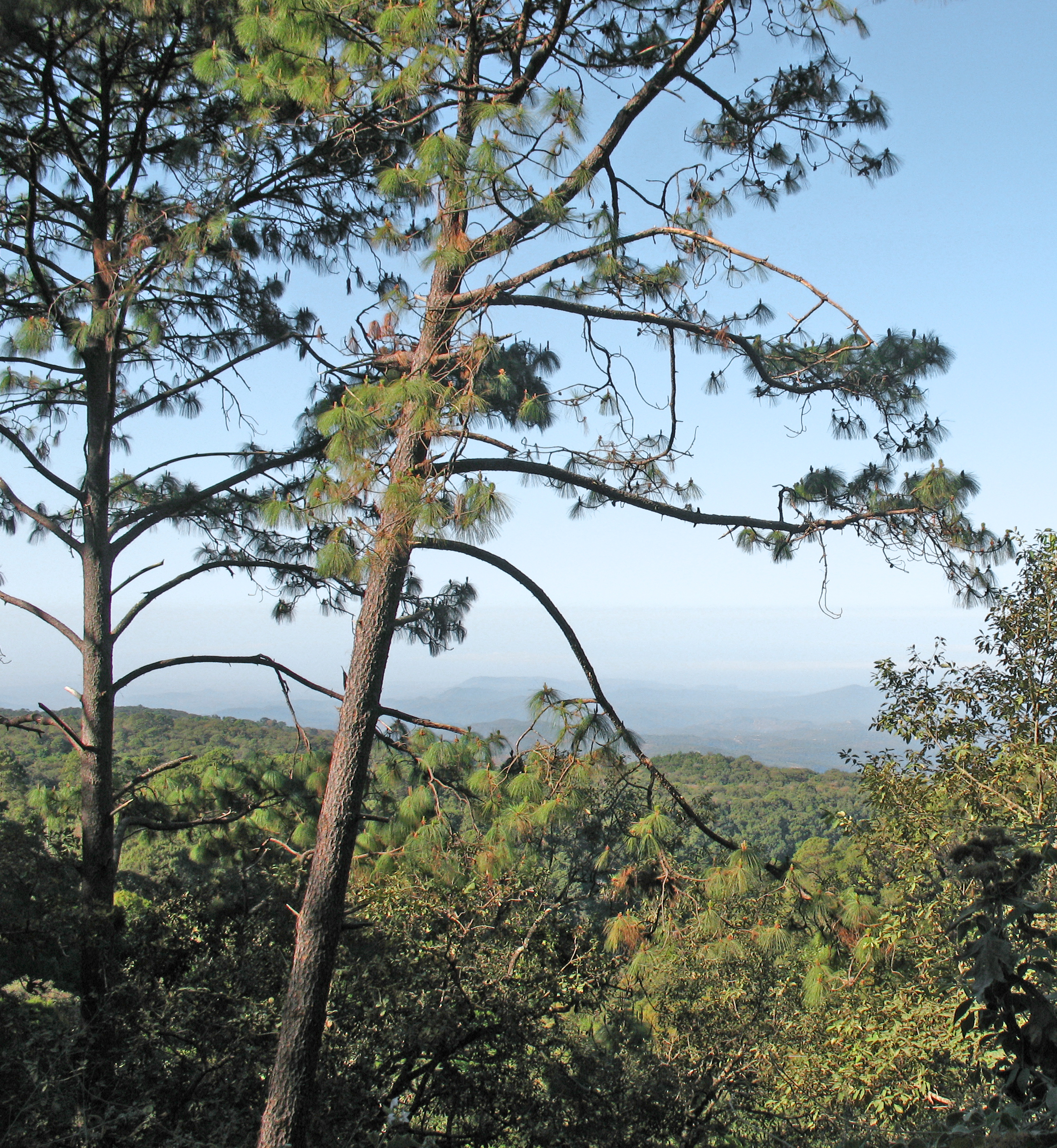 Pinus gordoniana, Viaje Tepic - Miramar pasando por la Cascada del Cora